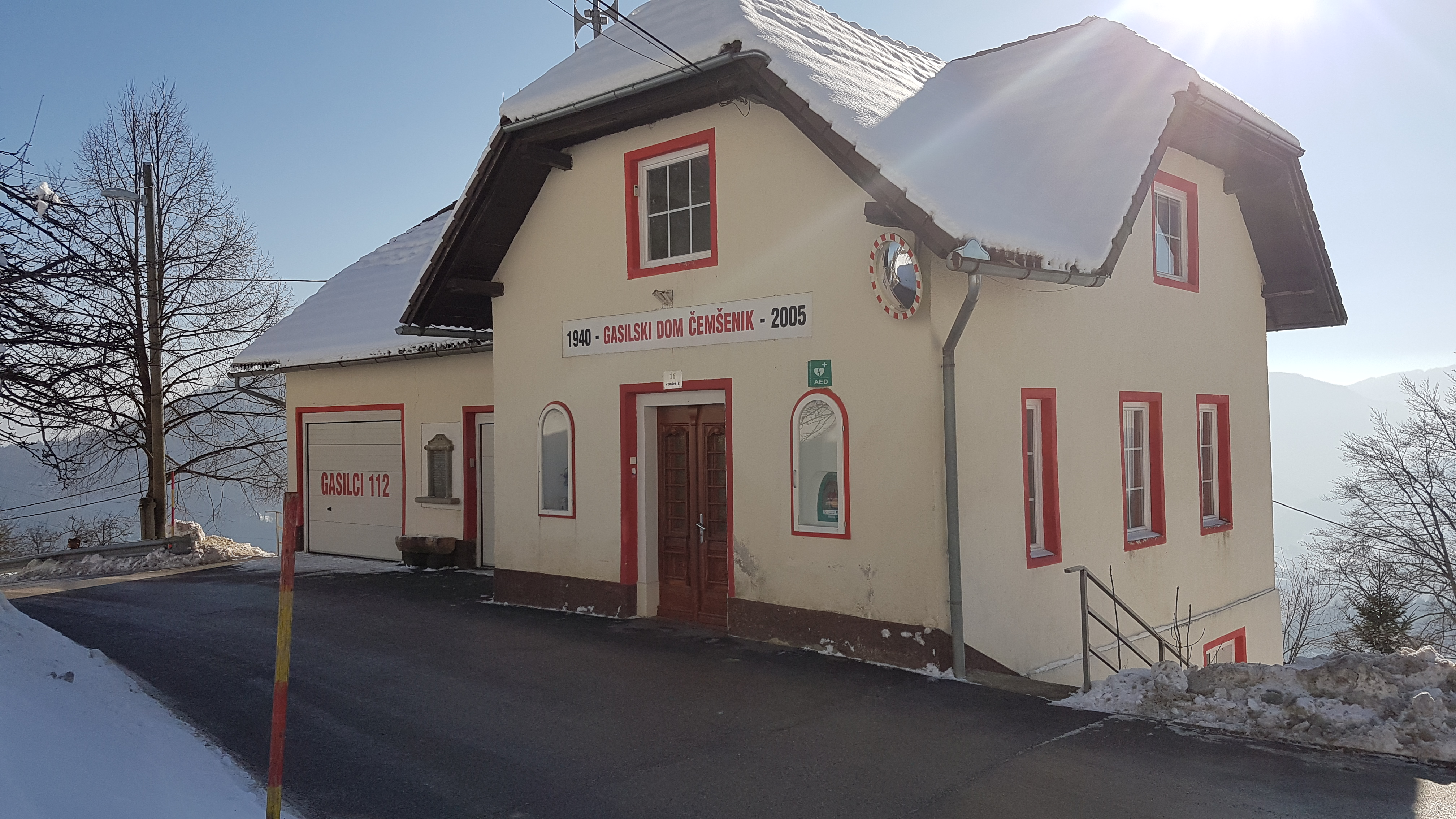 Gasilski dom v Čemšeniku